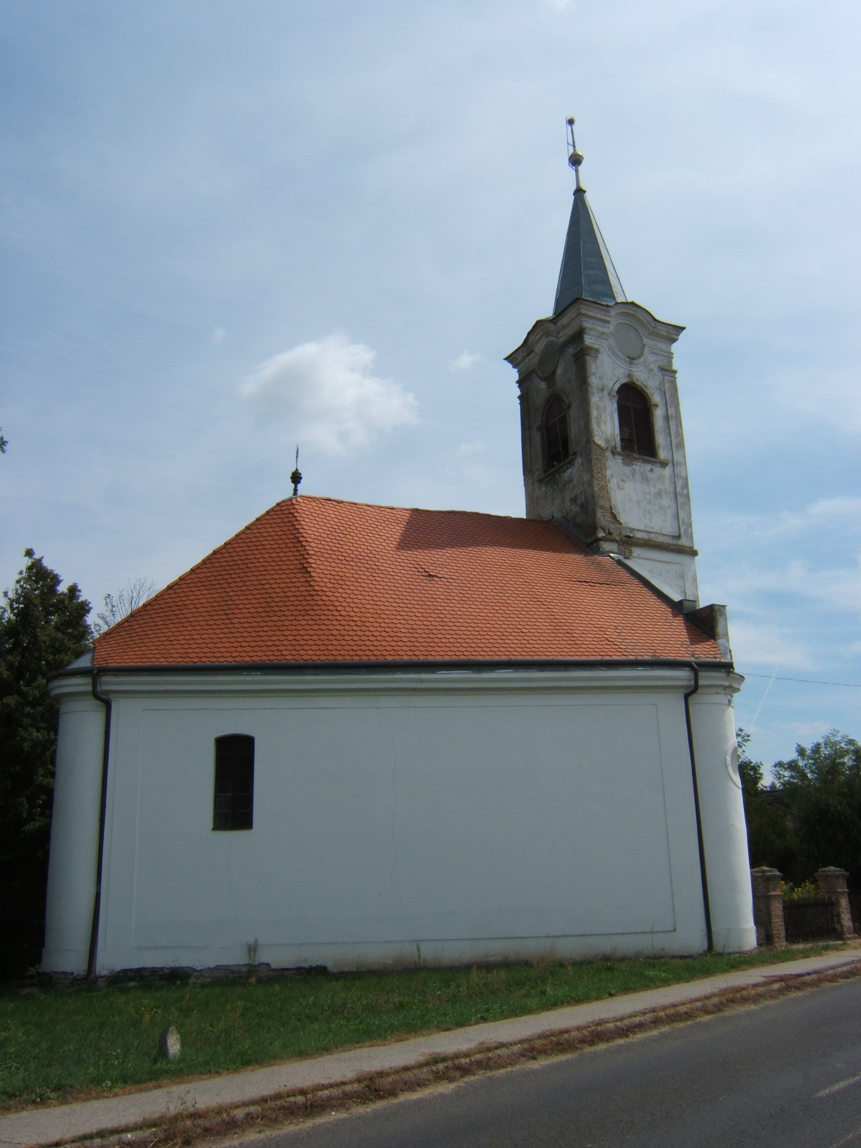 Kiskorpád, háromszögű templom